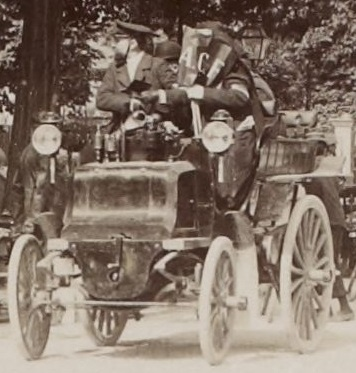 [Collection Jules Beau. Photographie sportive] : T. 7. Année 1898 / Jules Beau : F. 29. [Paris - Amsterdam et retour, 5 juillet 1898]